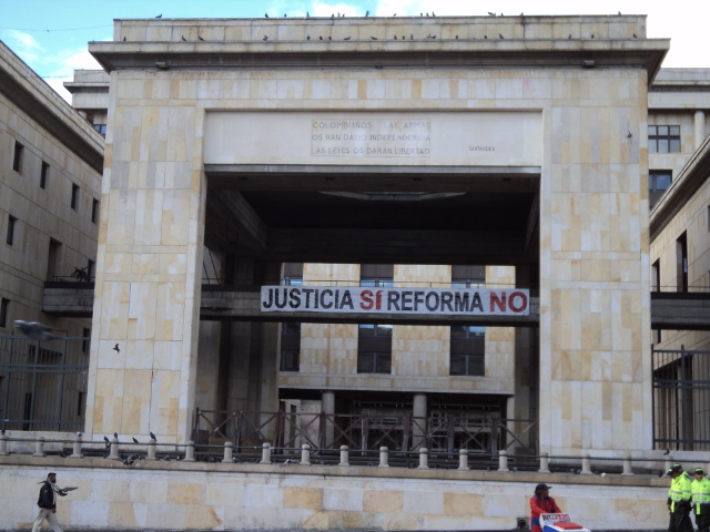 Pancarta contra a la Reforma a la Justicia en Colombia de 2012, ubicada en el Palacio de Justicia